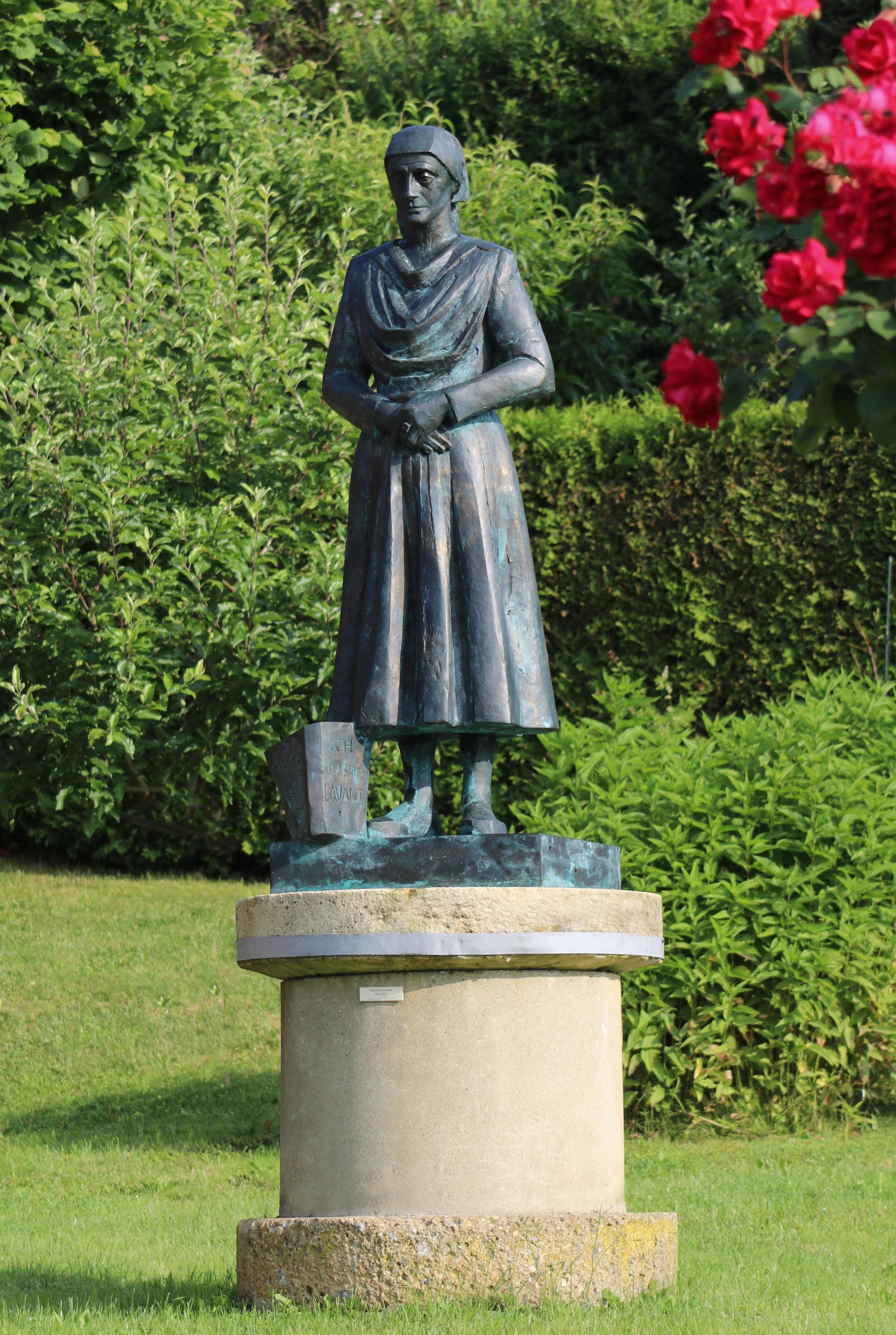 Denkmal der Dichterin Christine Lavant von Hortensia Fussy